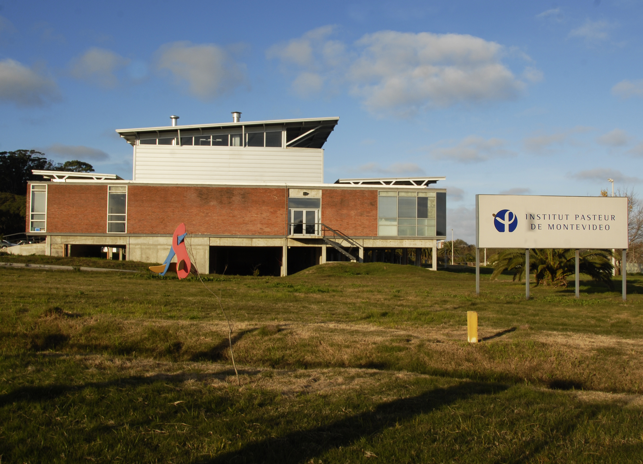 Insituto Pasteur de Montevideo